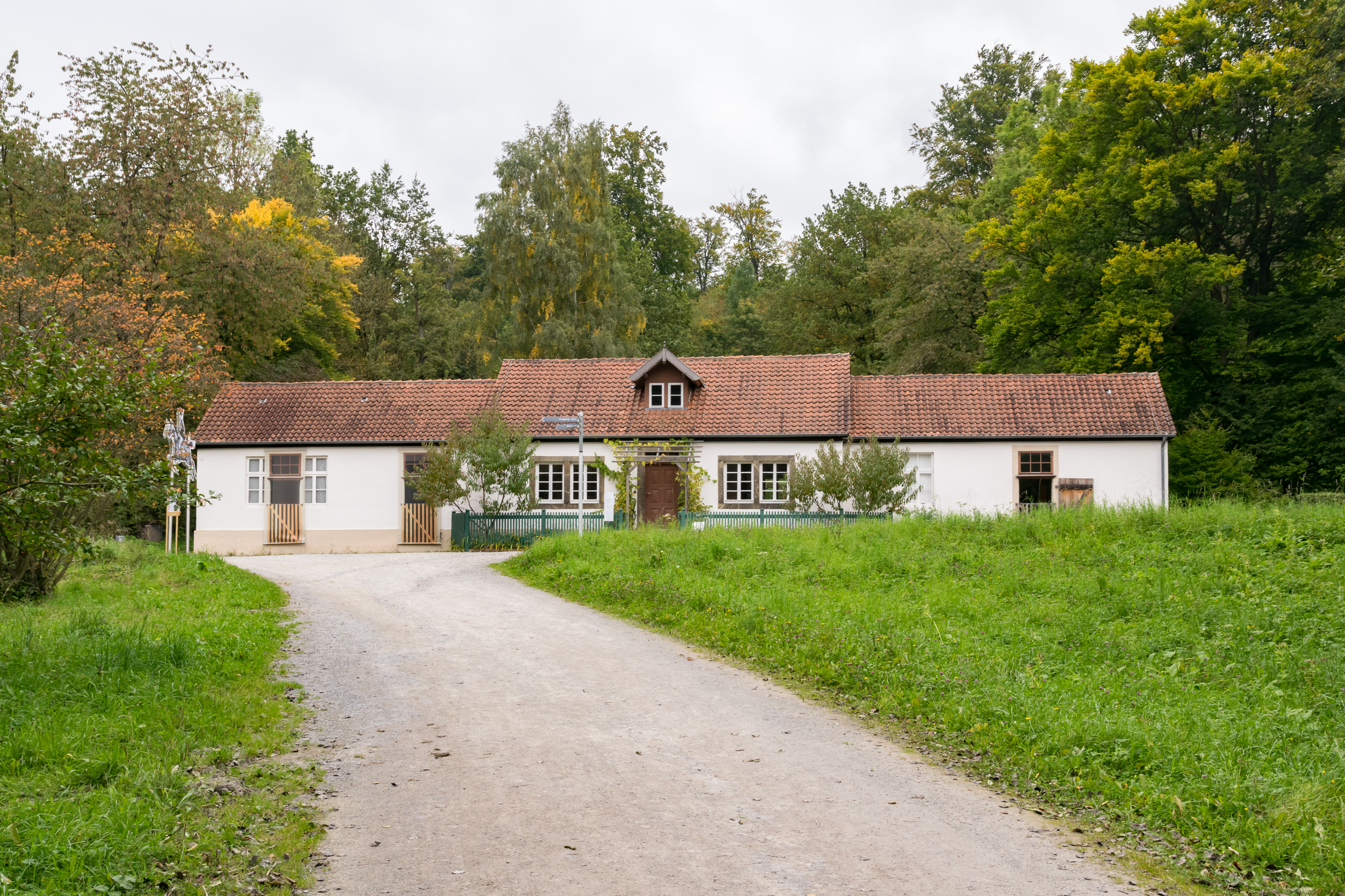 Ehemalige Fasanerie in Detmold, erbaut um 1836 nach Plänen des Landbaumeisters Ferdinand Wilhelm Brune, später umgebaut als Stall für Senner Pferde. Am Originalstandort heute Teil des LWL-Freilichtmuseums Detmold.